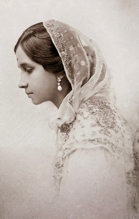 Maharani Shrimant Chandravati Bai Sahib Holkar, First Wife of Tukoji Rao Holkar III Maharaja of Indore